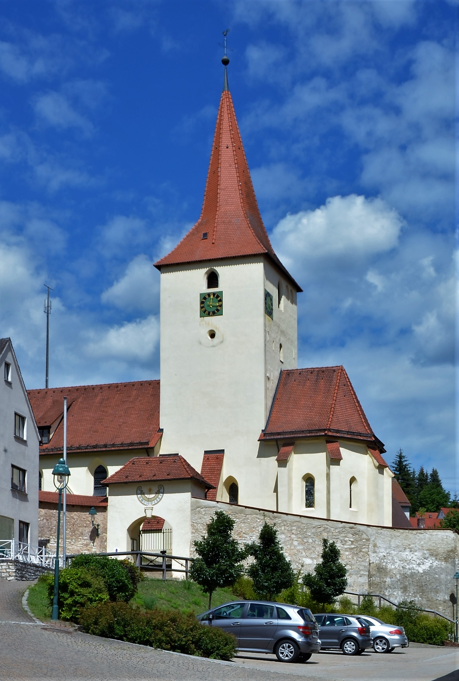 St. Bartholomäus Kirche in Alfeld (Mittelfranken)